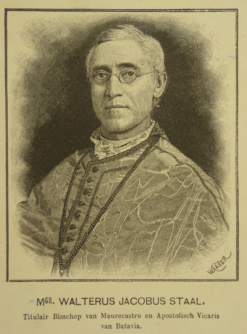 Mgr. W. J. Staal (1839-1897), apostolisch vicaris van Batavia, gravure J. Walter (coll. Catharijne Convent)